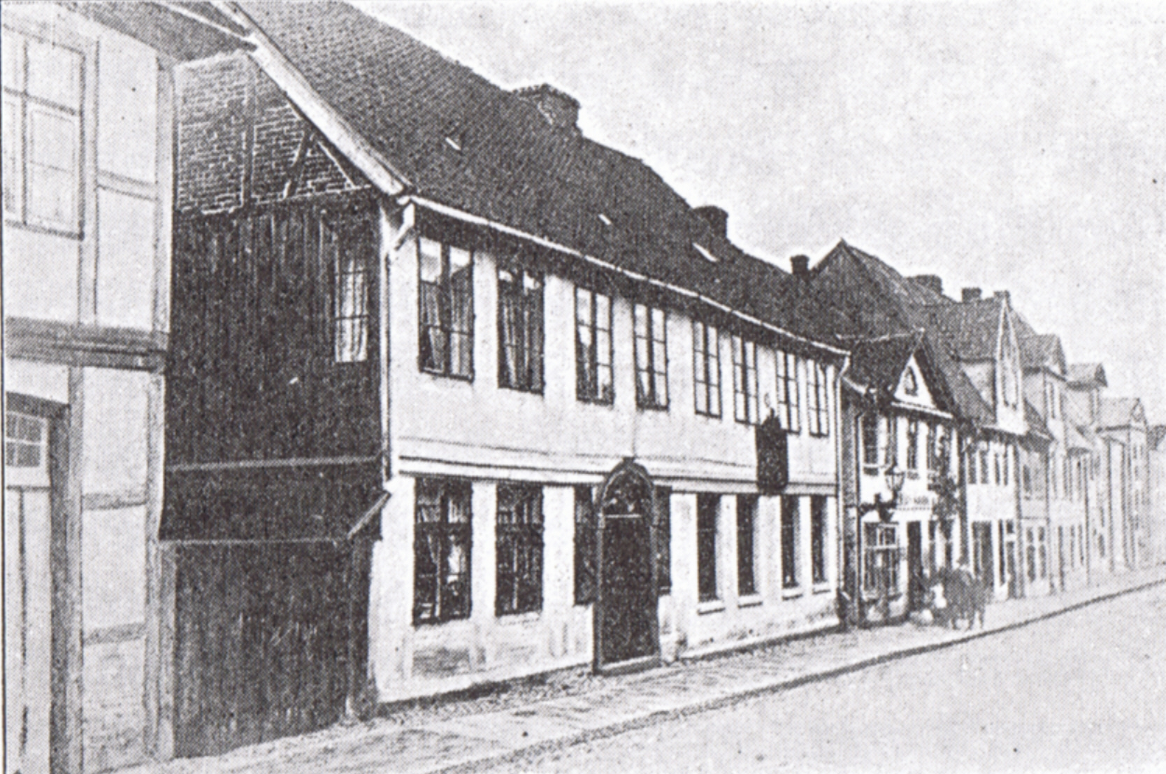 Geburtshaus von Carl Maria von Weber in Eutin.